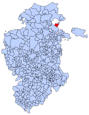 Situación de Jurisdicción de San Zadornil en el mapa de Burgos.